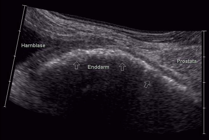 Sonographische Siescape-Darstellung einer durch eine benigne Prostatahyperplasie ausgelösten Koprostase bei einem Collie